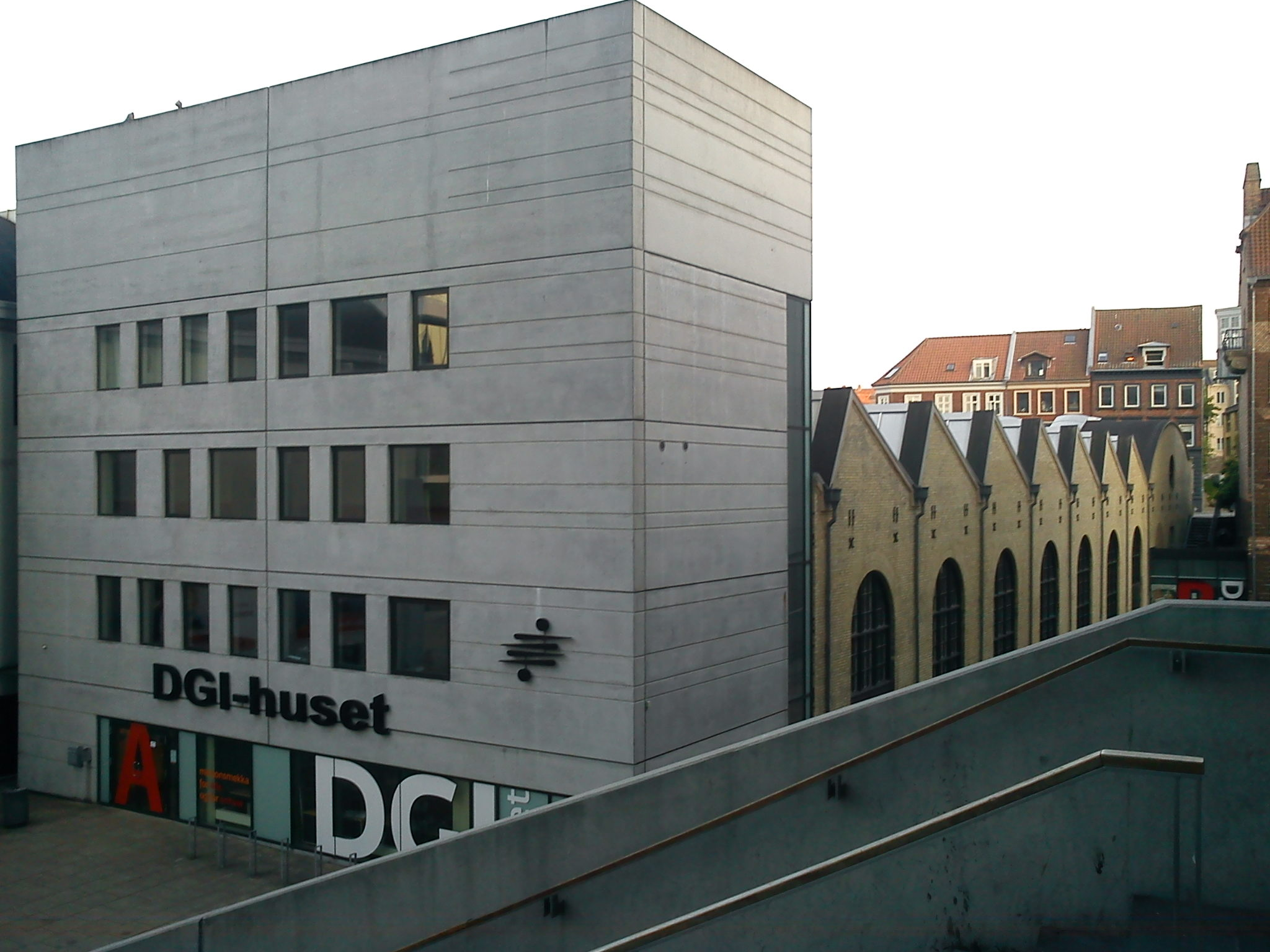 DGI-huset i Aarhus ved Bruun's Galleri i Jægergårdsgade.